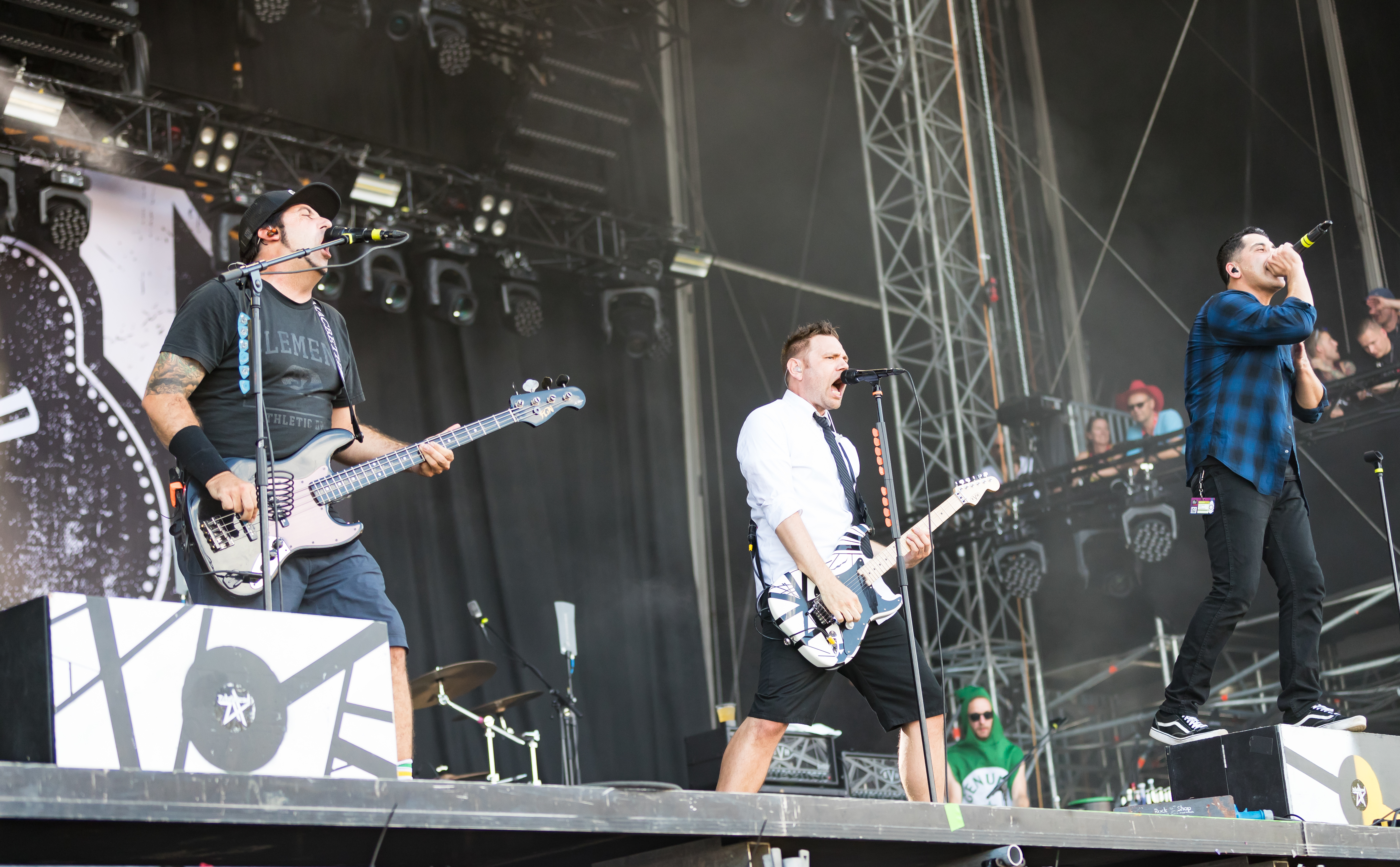 Zebrahead during DAS FEST at Baden-Württemberg, Karlsruhe, , Germany on 2017-07-22, Photo: Sven Mandel